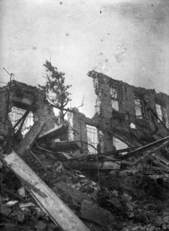 Ruiny pólnocnej ściany szpitala św. Jana Bożego, od podwórza w stronę ulicy Konwiktorskiej.